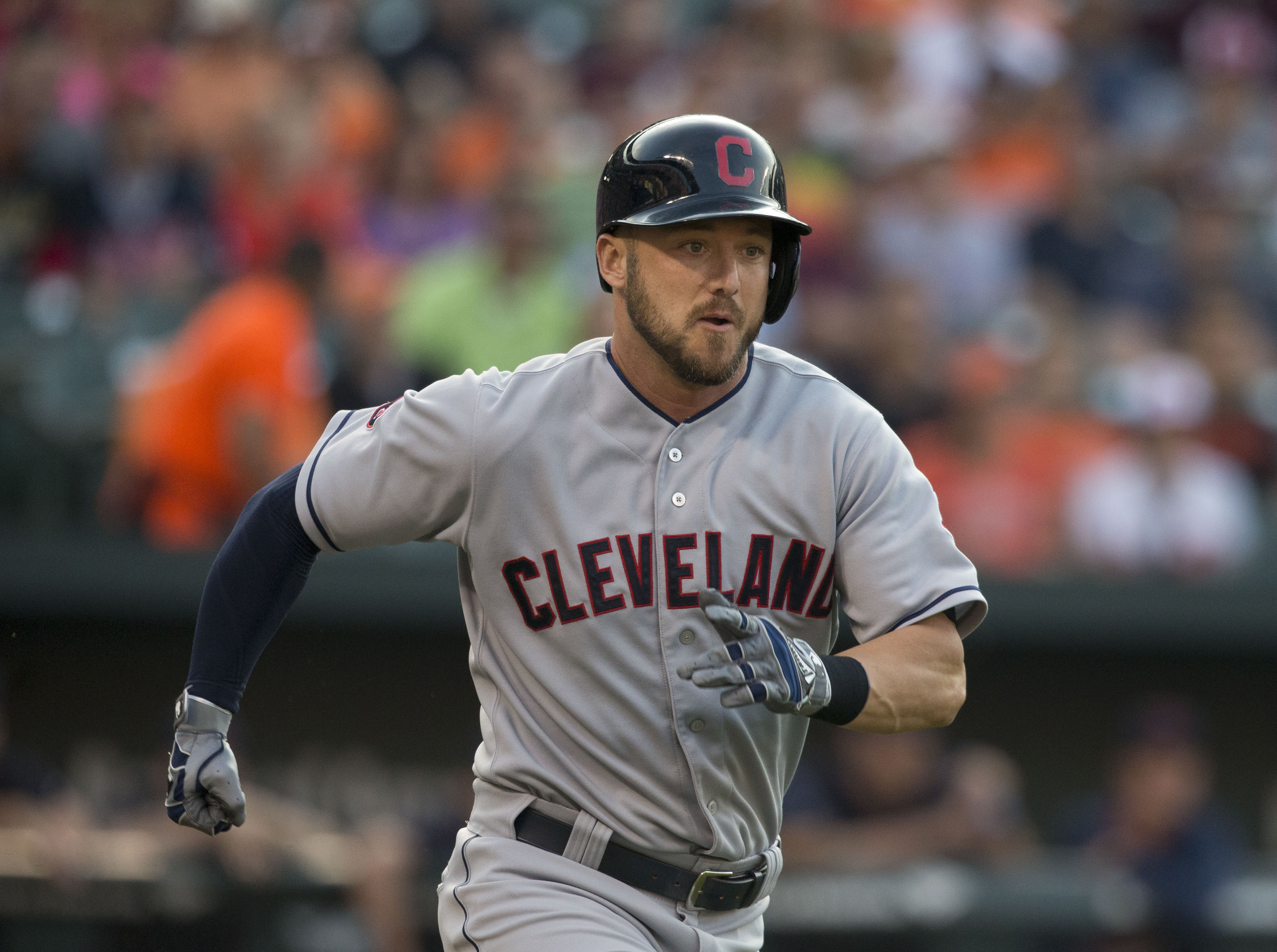 Ryan Raburn